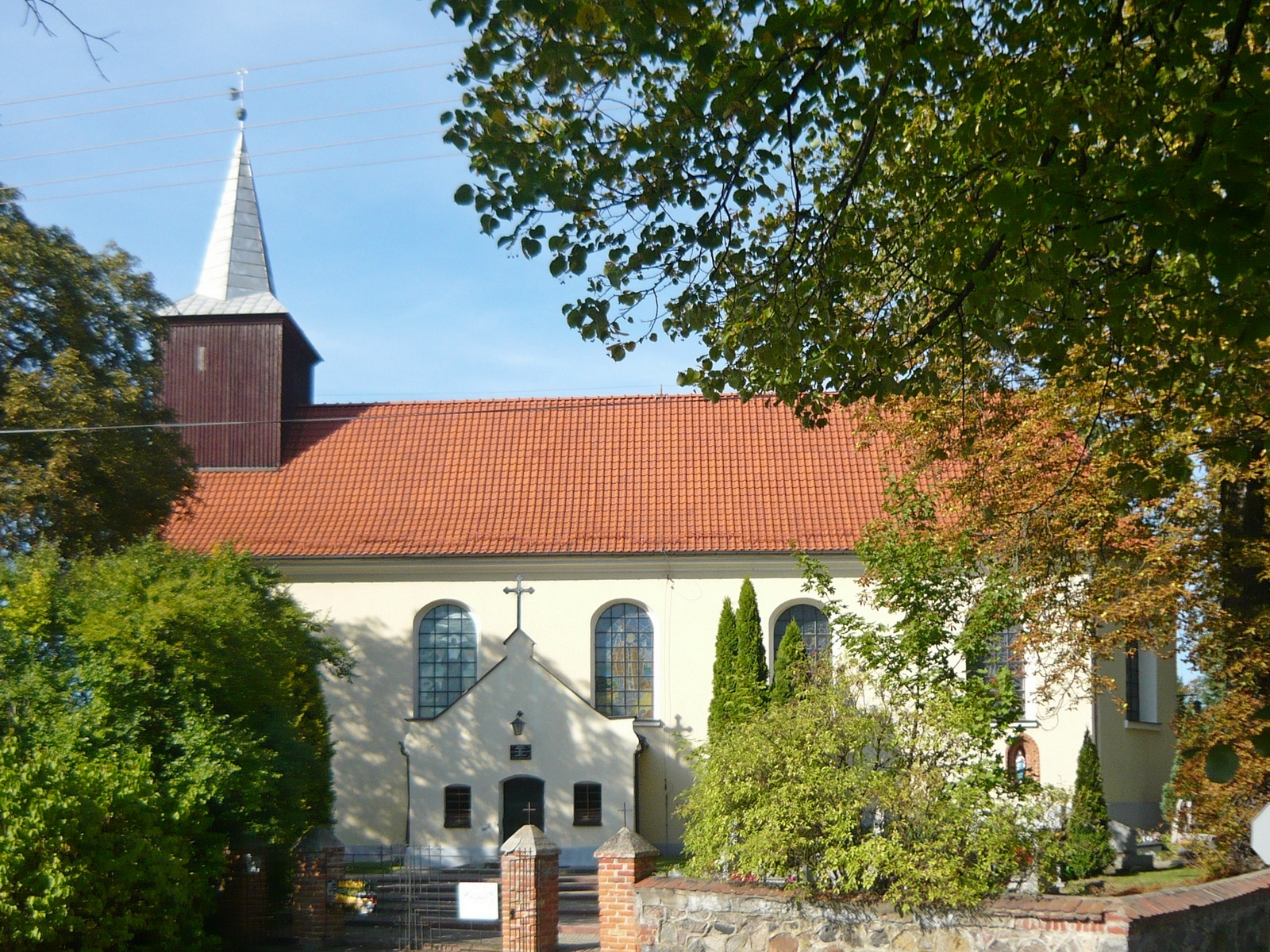 Godziszewo, ul. Ks. Sawickiego 1 - rzymskokatolicki kościół parafialny p.w. Świętego Jana Nepomucena, 1748.